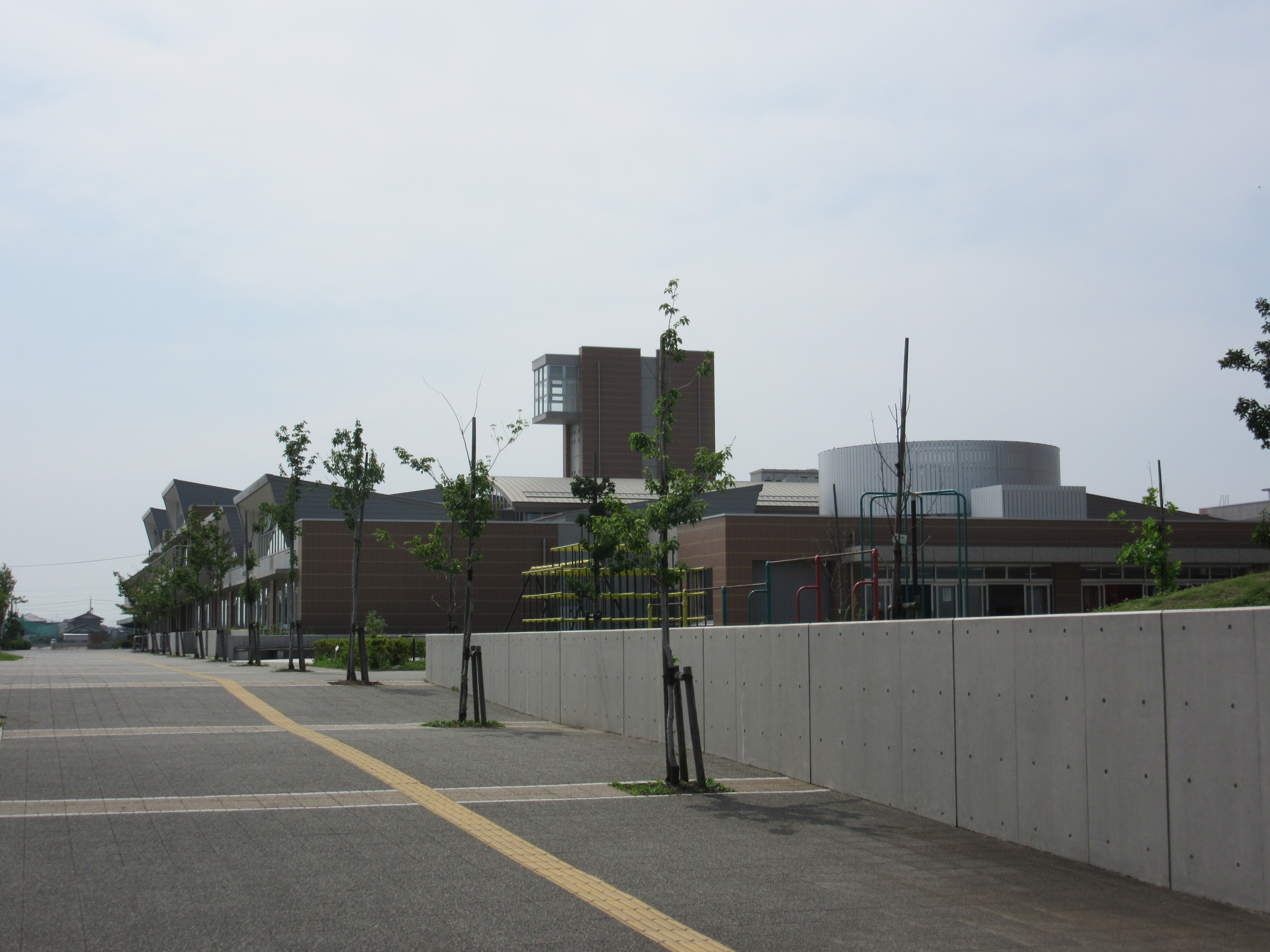 飛島学園（飛島小学校・飛島中学校）